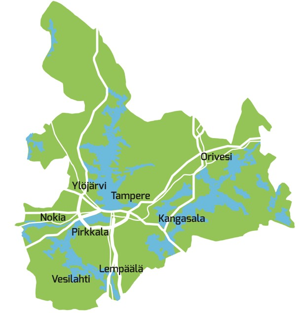 Tampereen kaupunkiseudun alue 2017